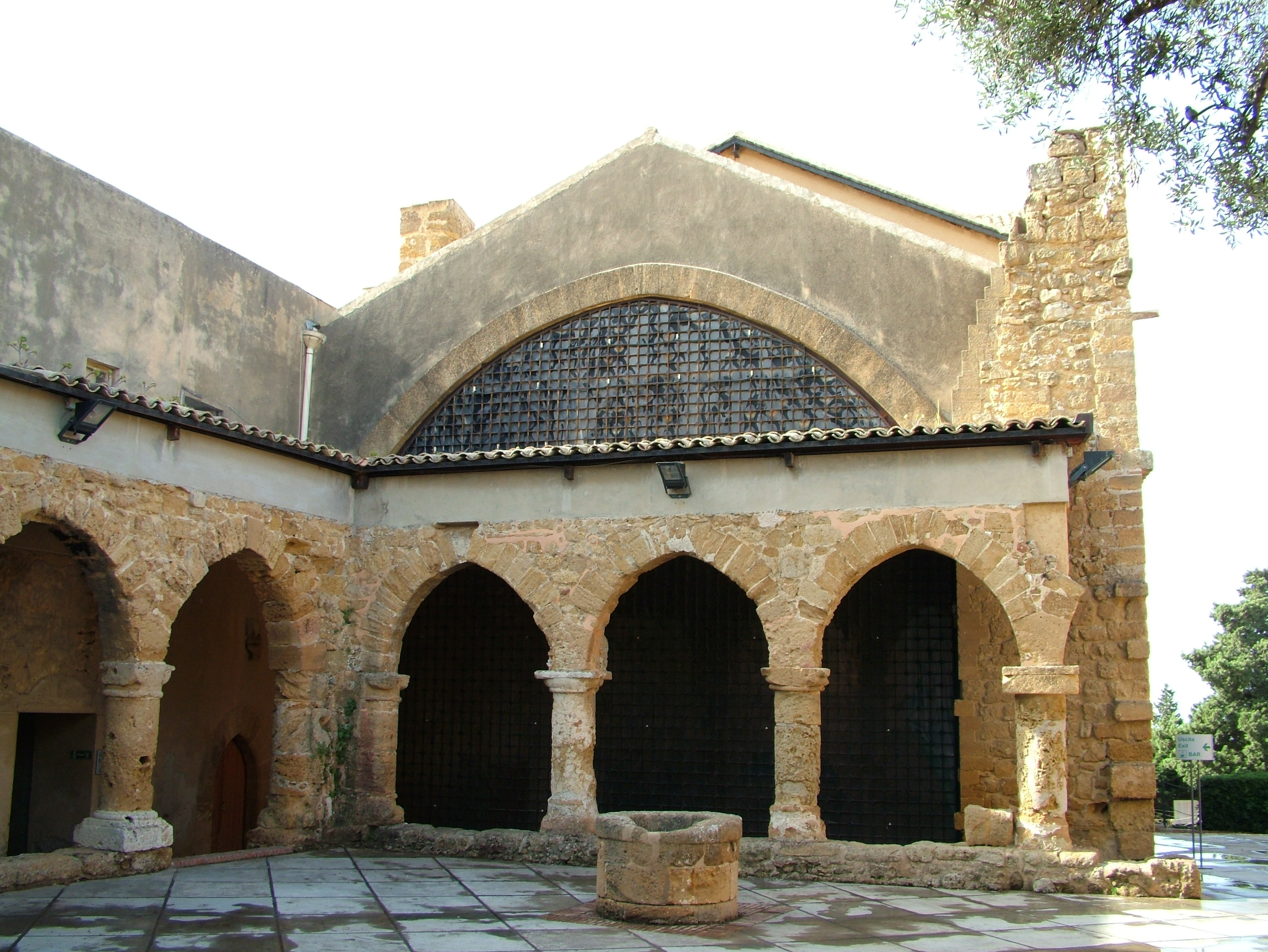 Agrigent, Sizlien, das Archeologische Museum der Innenhof beim Eingang von Norden.